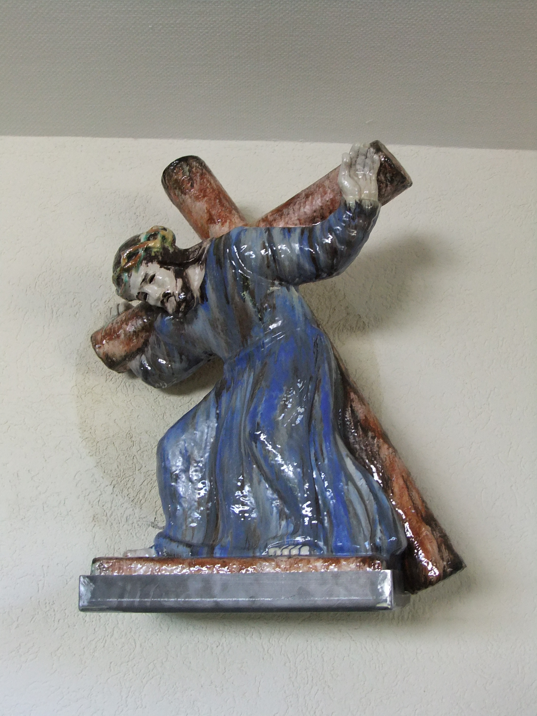 Die Christusplastik von Jakob Brüllmann an der Martin-Luther-Kirche (Stuttgart-Sillenbuch)